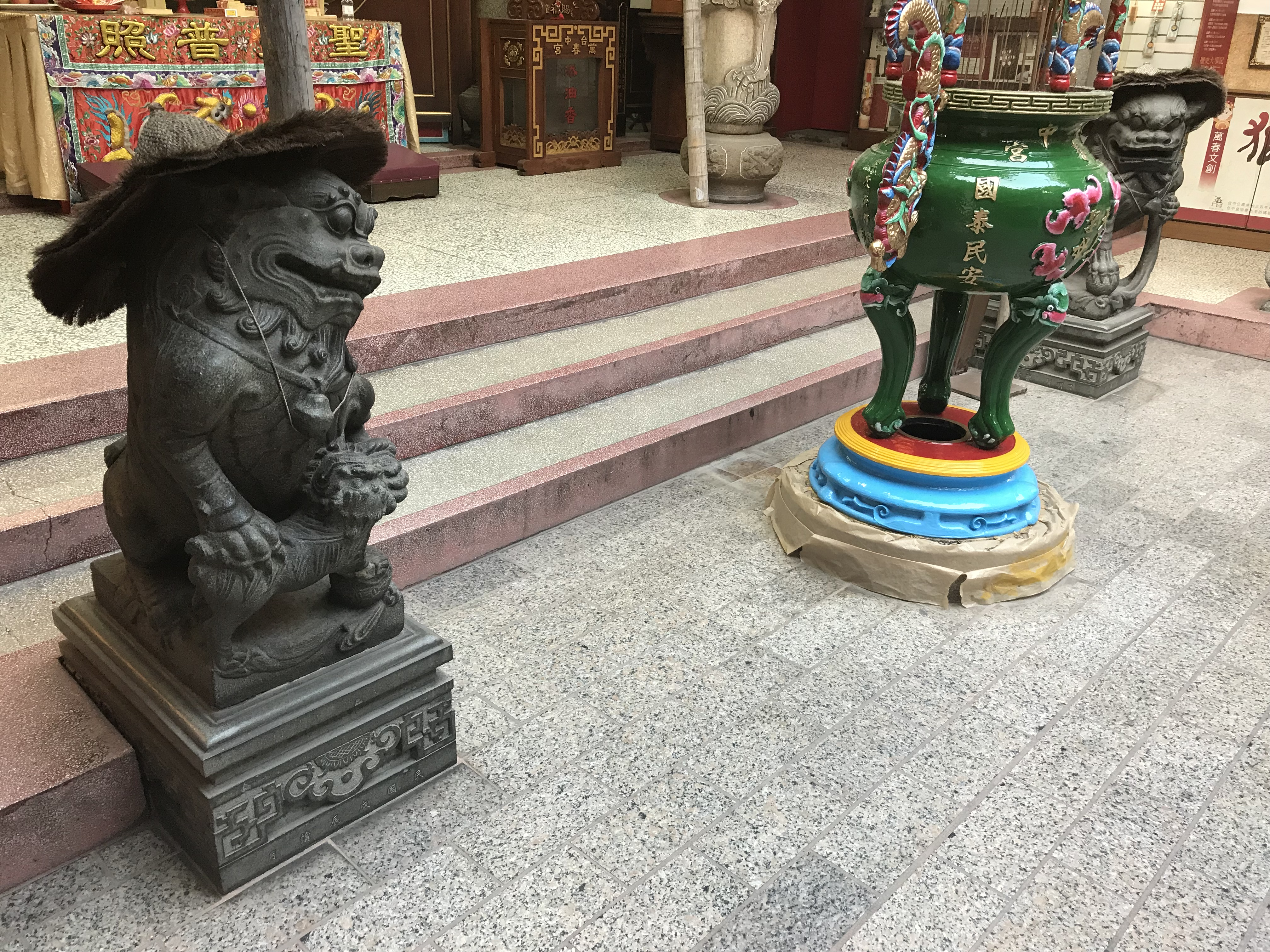 萬春宮石獅